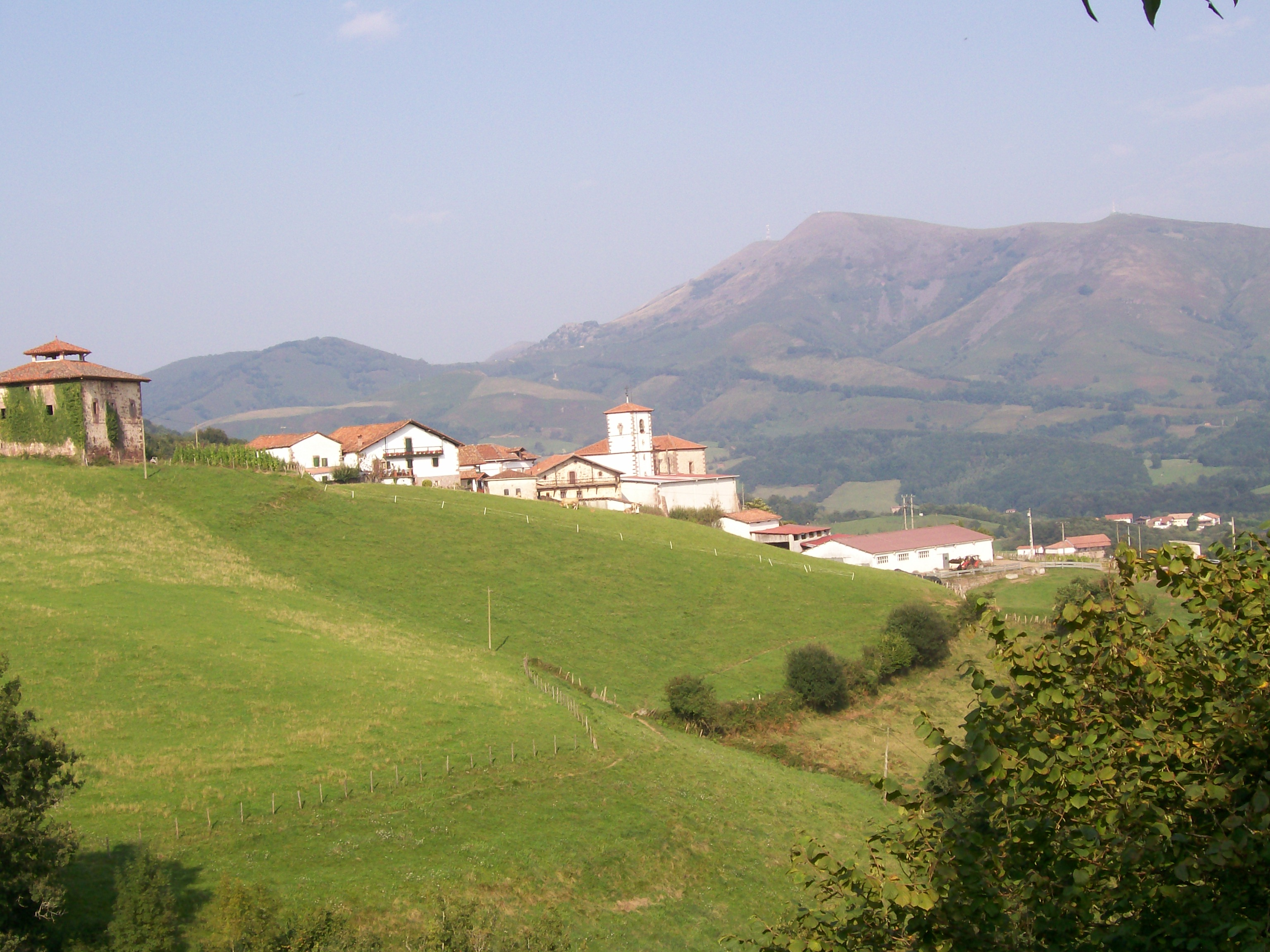 Baztango Azpilikueta herriaren ikuspegia